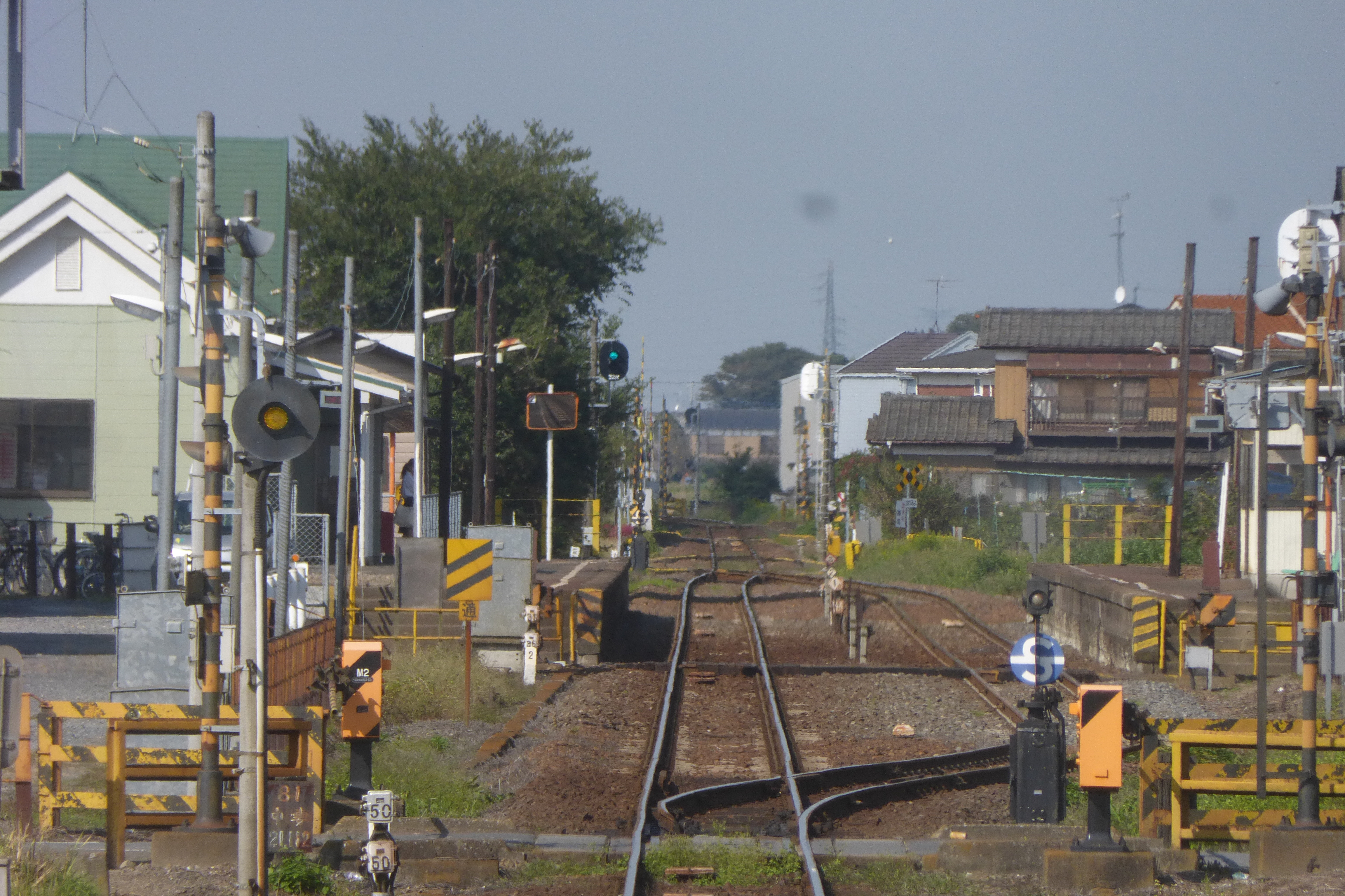 Nakatsuma Station (中妻駅)